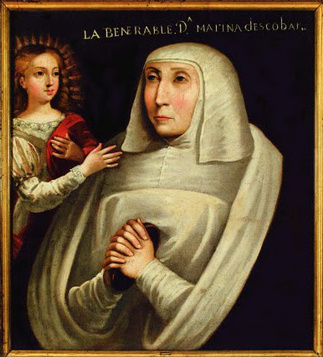 Retrat de la venerable Marina de Escobar. Anònim del s. XVII. Monasterio de las Brígidas (Valladolid).